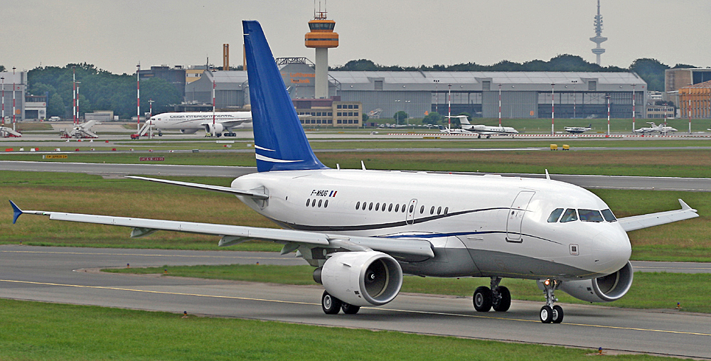 Ein Airbus A318 ACj Elite rollt zum Rollhaltepunkt auf dem Flughafen Hamburg-Fuhlsbüttel